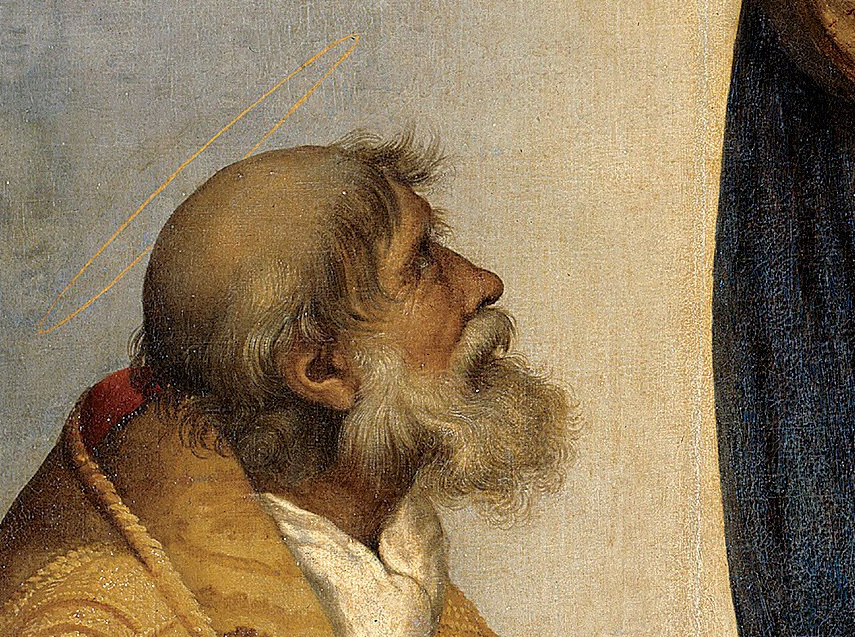 Phantasieporträt von Papst Sixtus II. Ausschnitt aus Raffaels Sixtinischer Madonna